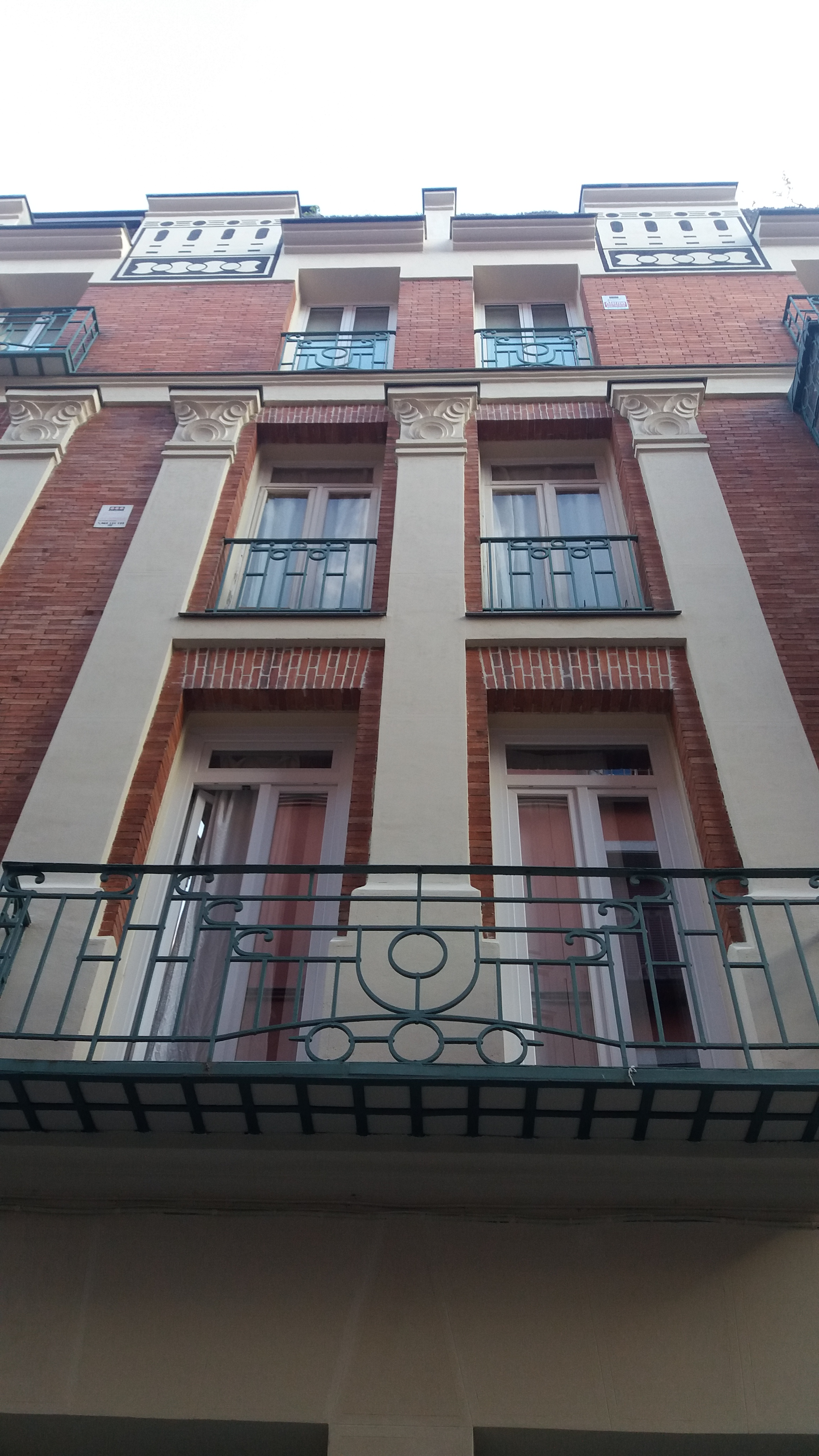 Edificio modernista en la Calle de los Señores de Luzón, número 9, en Madrid (España). Fue construido en 1911 por Eduardo Ferrès i Puig y Manuel Álvarez Naya